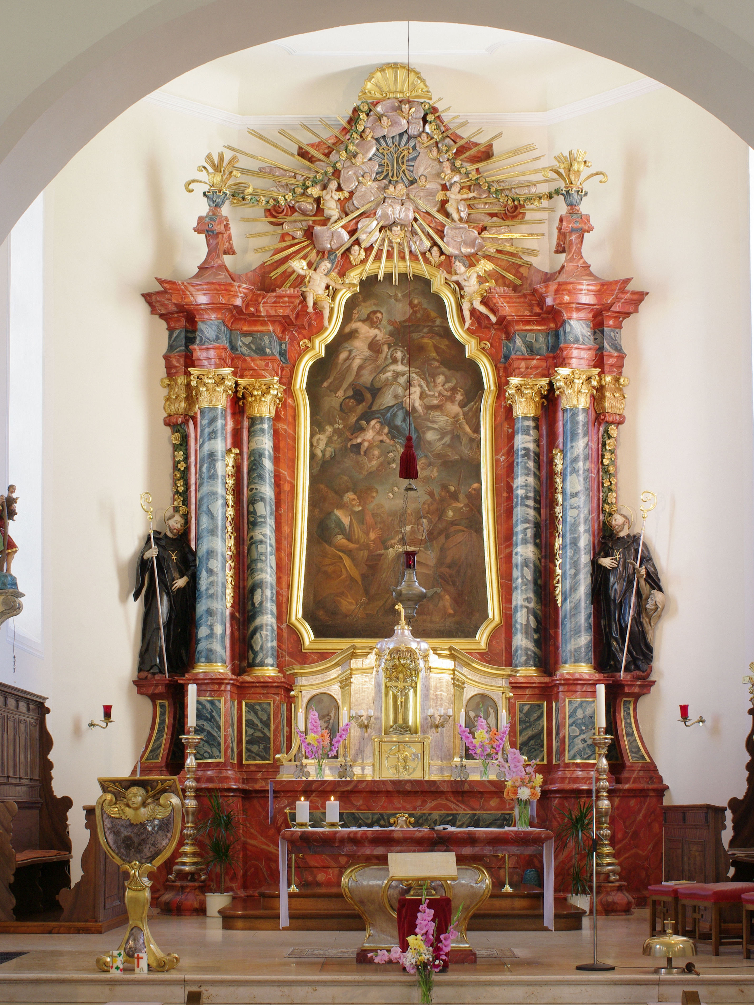 Hochaltar